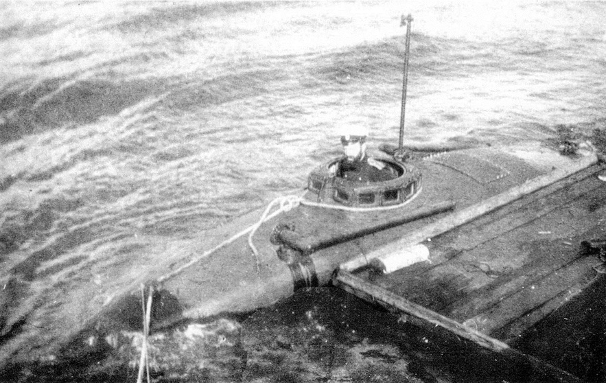 Подводная лодка "Кета" перед отправкой на Дальний Восток.